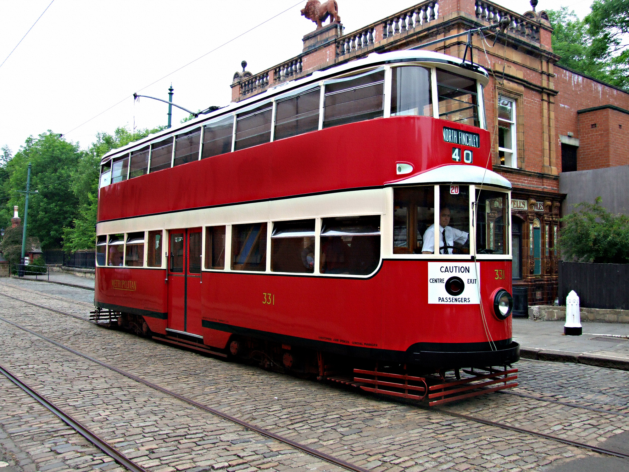 Feltham 331 in het National Tramway Museum te Crich, England